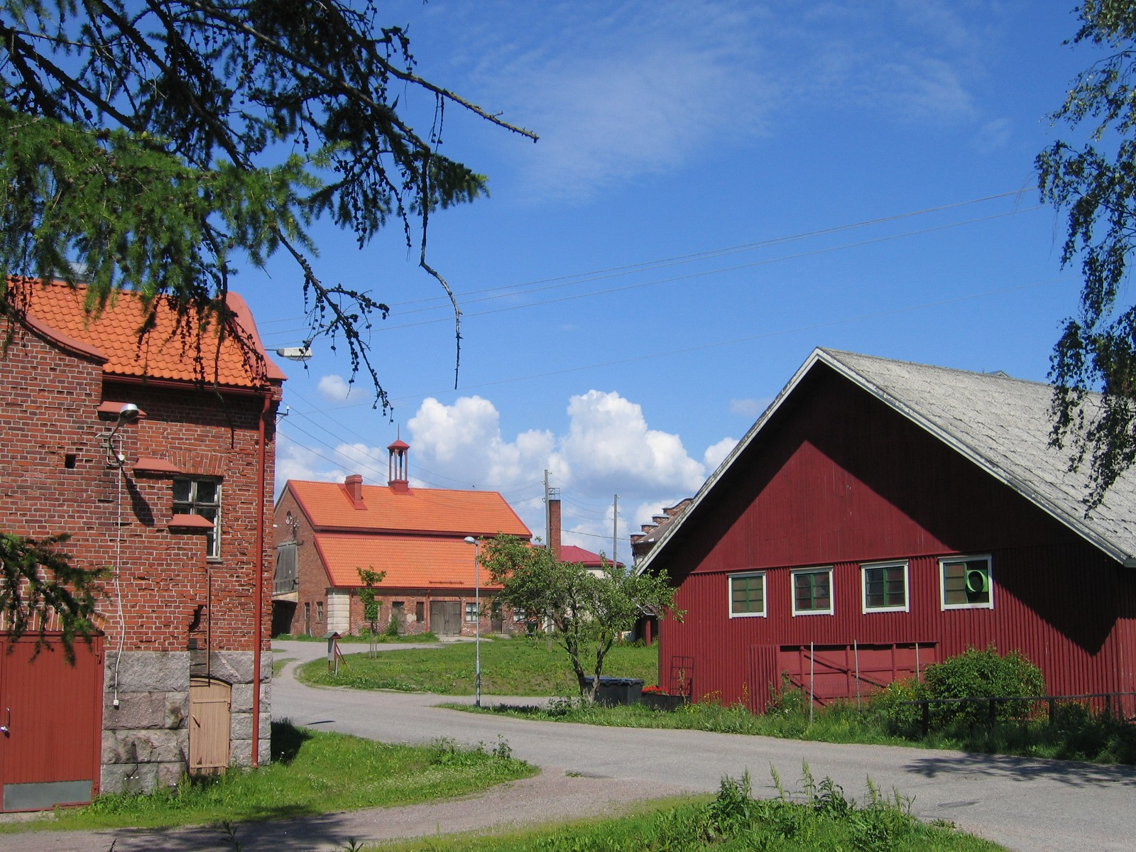 Buildings at Backas manor in Pakkala district, Vantaa, Finland